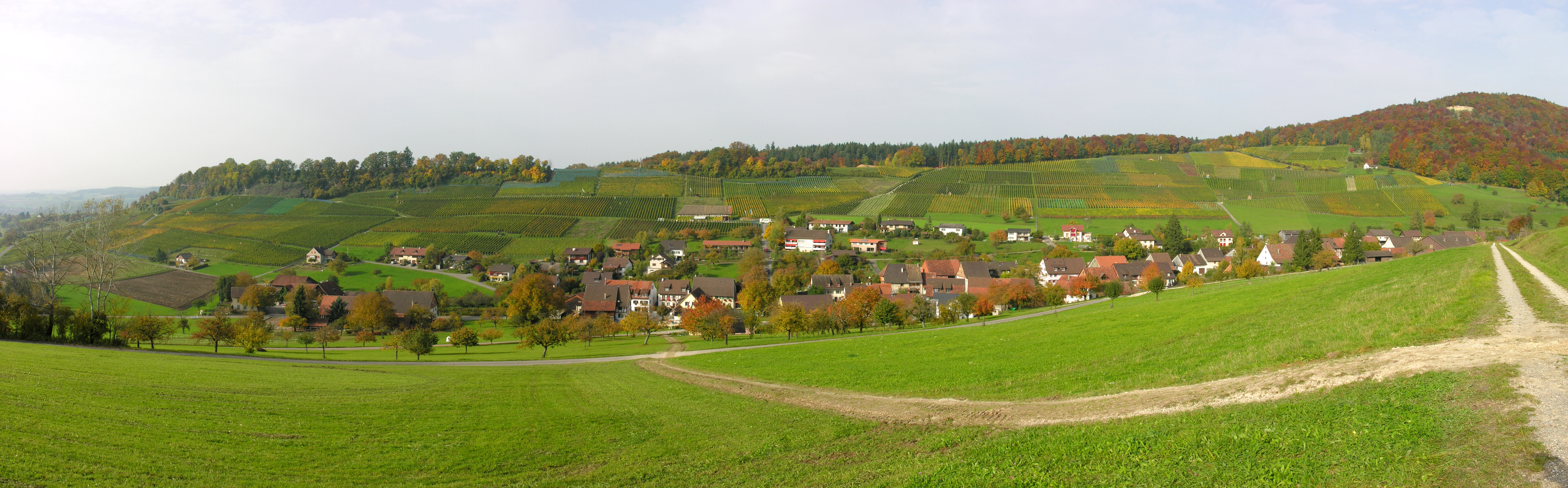 Switzerland, Schaffhausen, Osterfingen